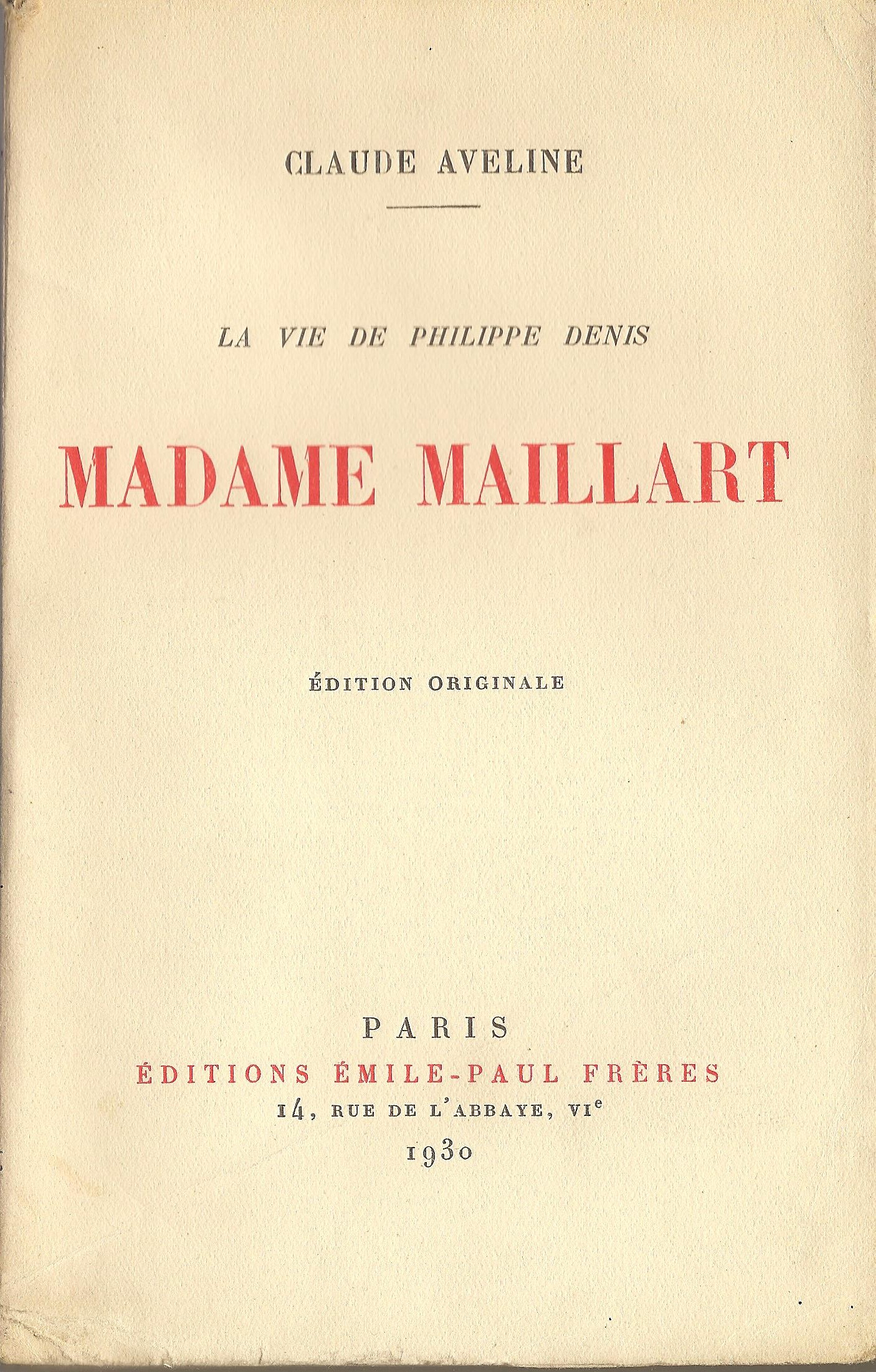 Couverture de "Madame Maillard" de Claude Aveline, 1930